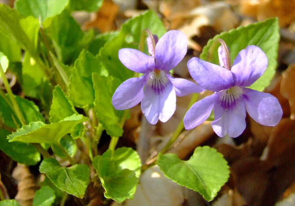 Illatos ibolya (Viola odorata)